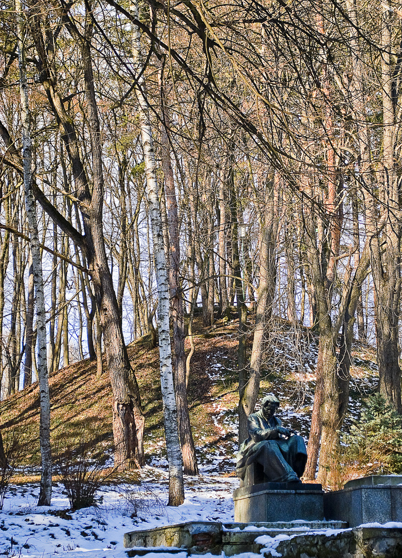 Sectia ”Dumitru si Alice Rosetti-Tescanu George Enescu” Comuna Beresti-Tazlau, sat Tescani - Vedere de la poarta principala